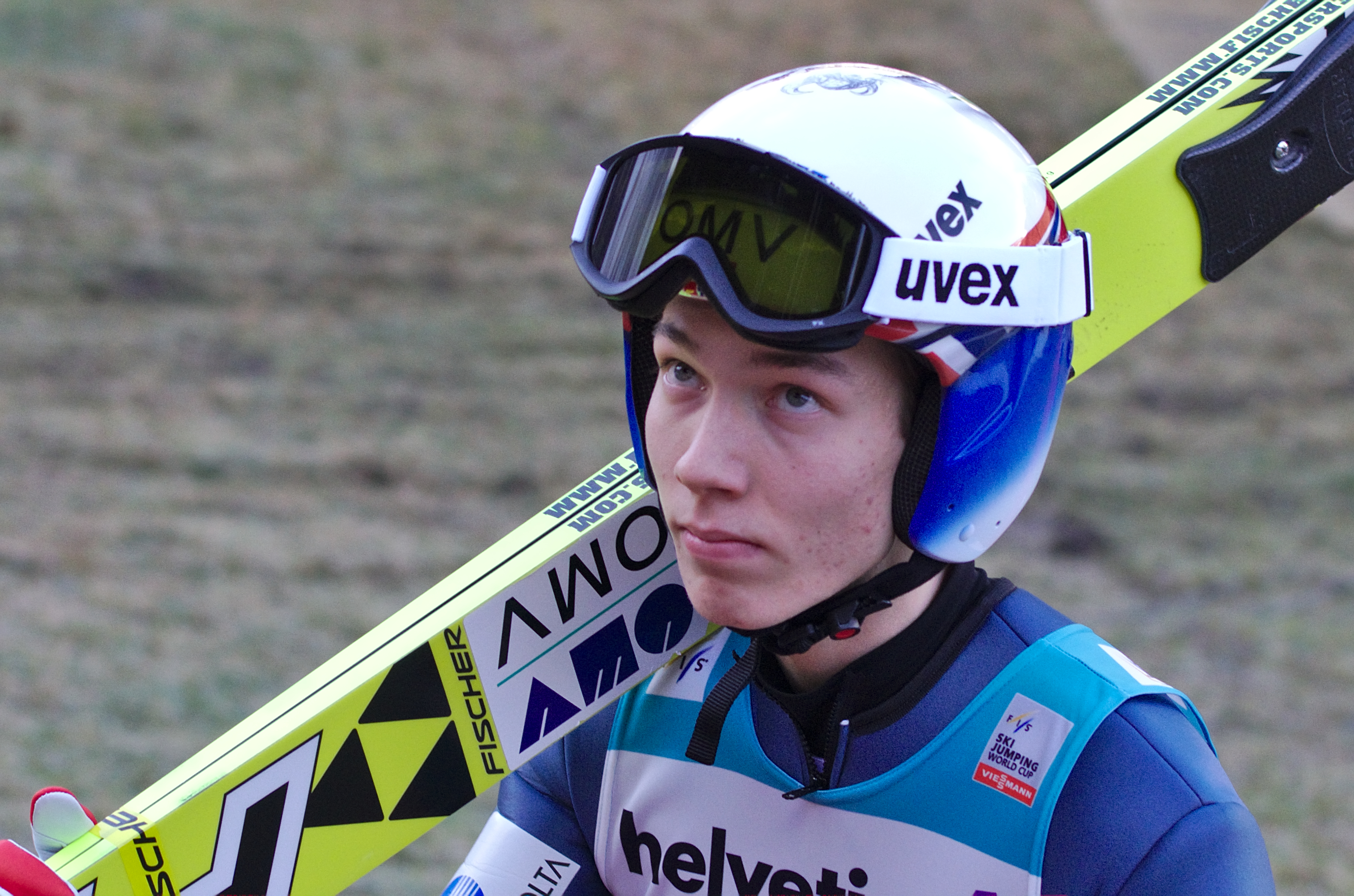 FIS Ski Jumping World Cup 2014 - Engelberg - 20141221 - Johann A. Forfang